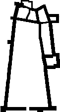 Plan ruin zamku w Kazimierzu Dolnym nad Wisłą.